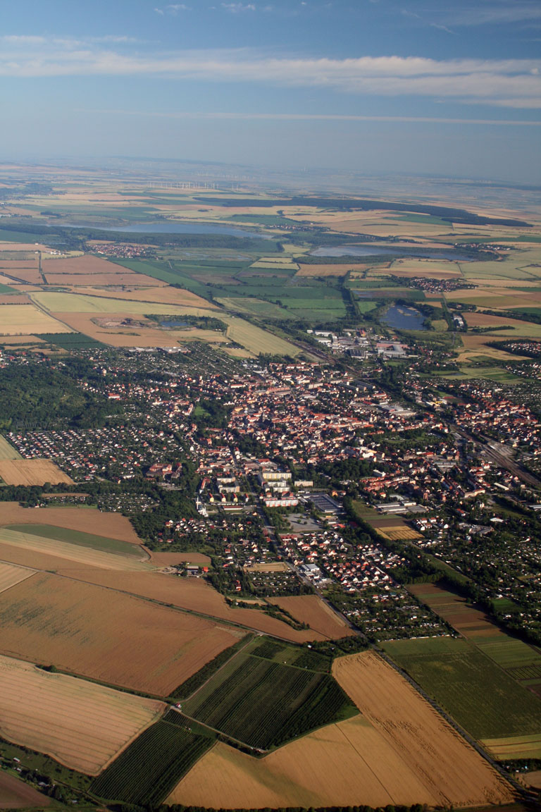 Stadt Aschersleben, DE-ST; von Süden aufgenommen